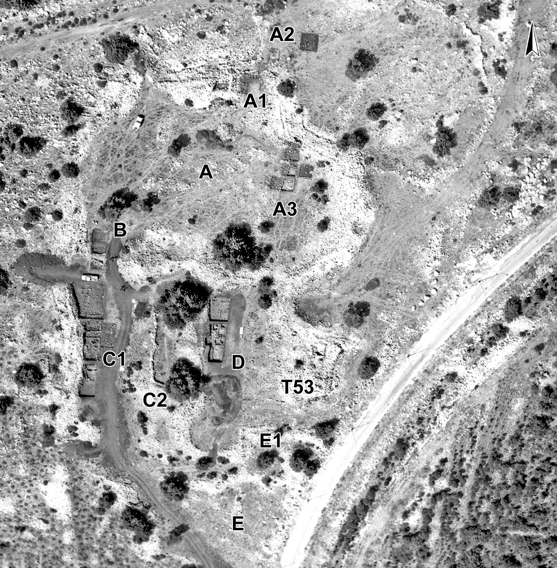 אל-אחוואט הוא אתר ארכאולוגי מתקופת הברזל הממוקם בשומרון ליד היישוב קציר מראה מהאוויר של אל-אחוואט ושטחי החפירה. שימו לב לחומה הגלית המקיפה את העיר